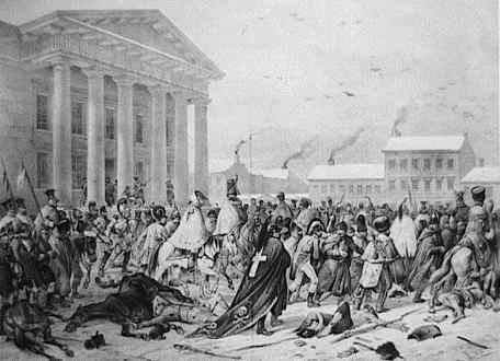 Grįžtanti Napoleono armija Vilniaus rotušės aikštėje French Army flight through Vilnius Town Hall in 1812 Odwrót wojsk francuskich w 1812 na placu przy ratuszu w Wilnie